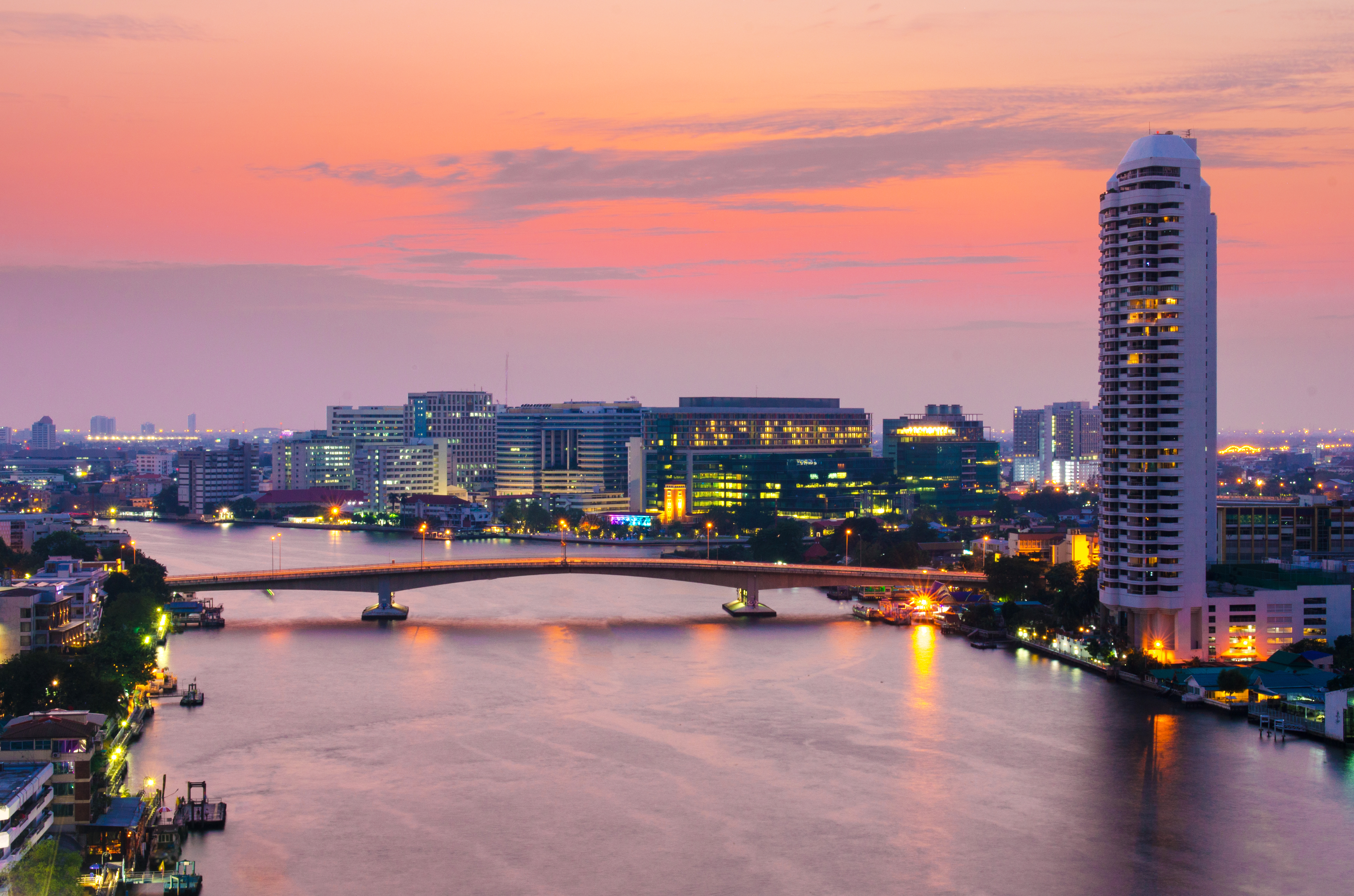 สะพานพระปิ่นเกล้าเป็นสะพานแบบคอนกรีตอัดแรงชนิดต่อเนื่อง มีจำนวนช่องทางรถวิ่ง 6 ช่องทางจราจร ความกว้างของสะพาน 26.60 เมตร ความยาว 622 เมตร